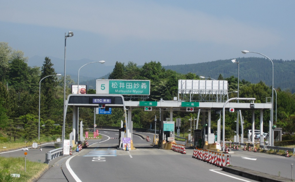 松井田妙義インターチェンジ（出口料金所）